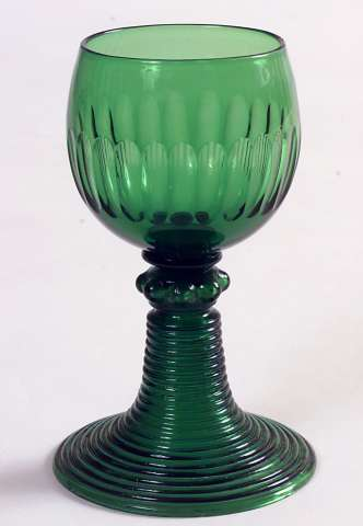 Rømer i glass. Høyde 11,5 cm. Norsk Folkemuseum. NF.1915-792